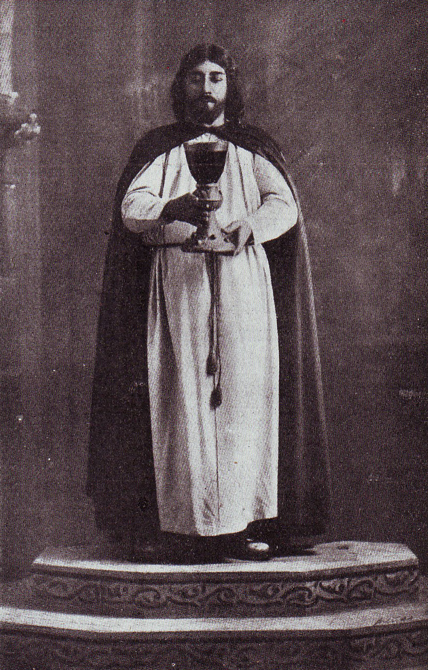 El tenor español Francisco Viñas Dordal como Parsifal